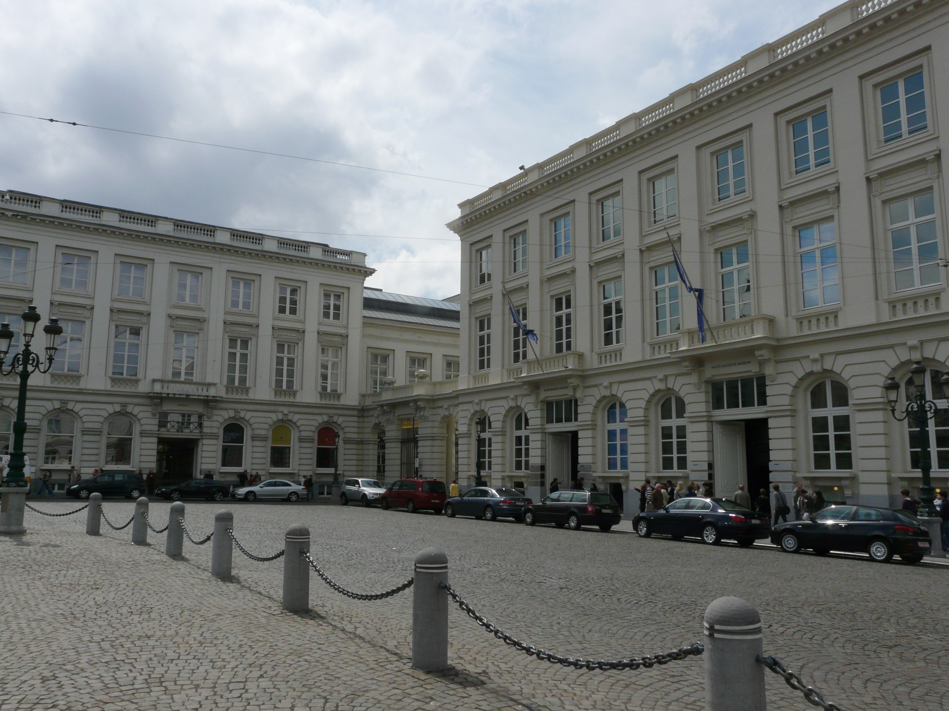 Voorzijde Musee Magritte Museum